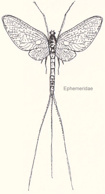 Ephemeridae